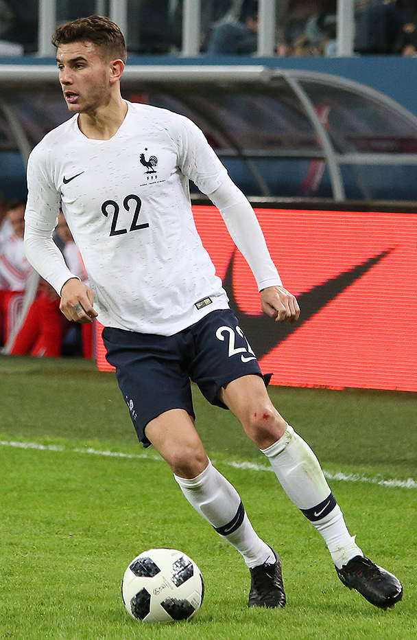 Сборная России проиграла французам